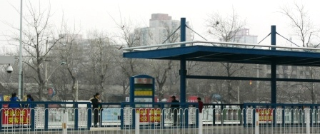 北京快速公交的站台，2005年2月8日拍摄于沙子口车站。